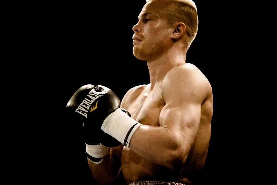 Jussi Koivula 20.4. 2013